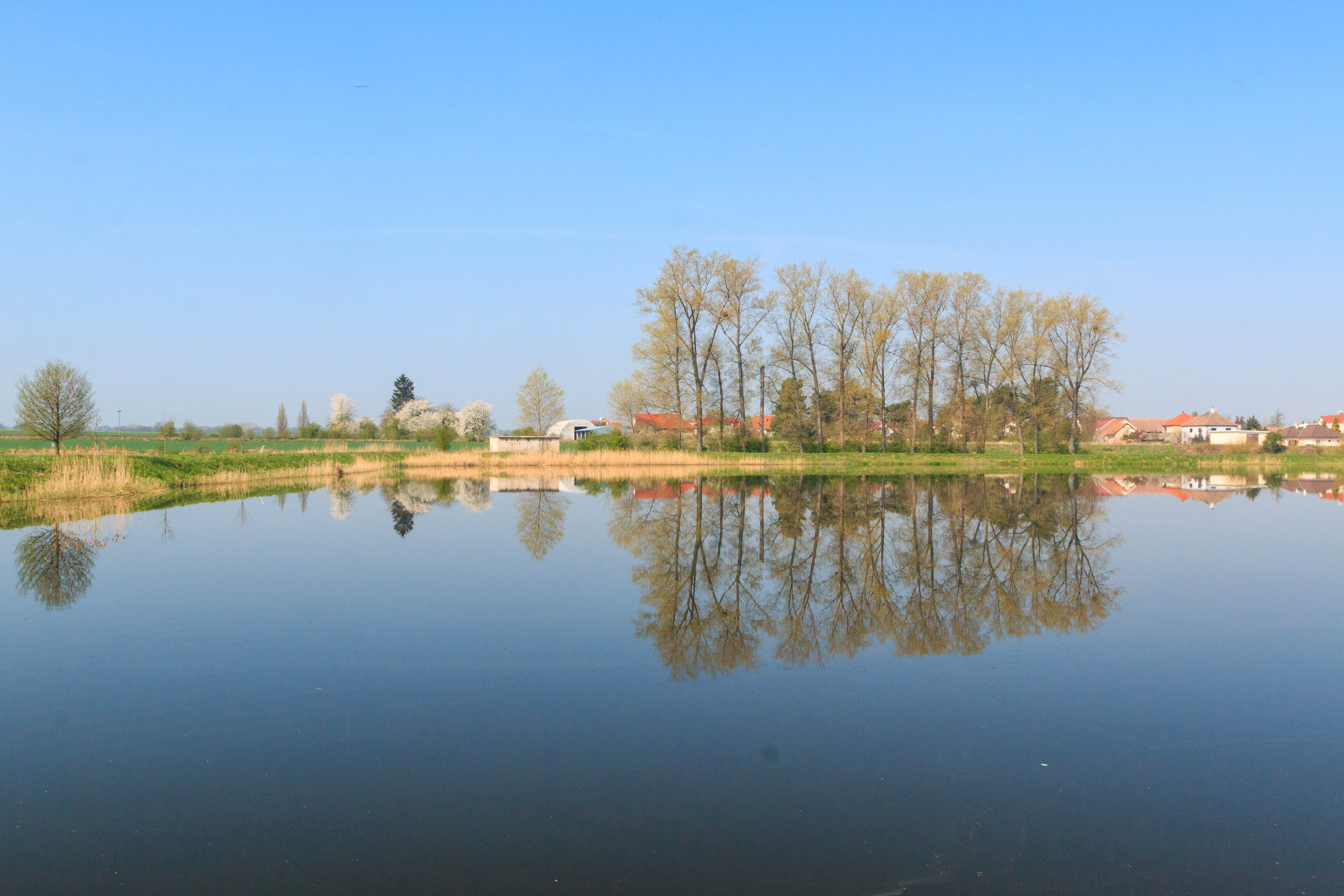 Rybník Křižný u Starých Jesenčan Project: Vodstvo.